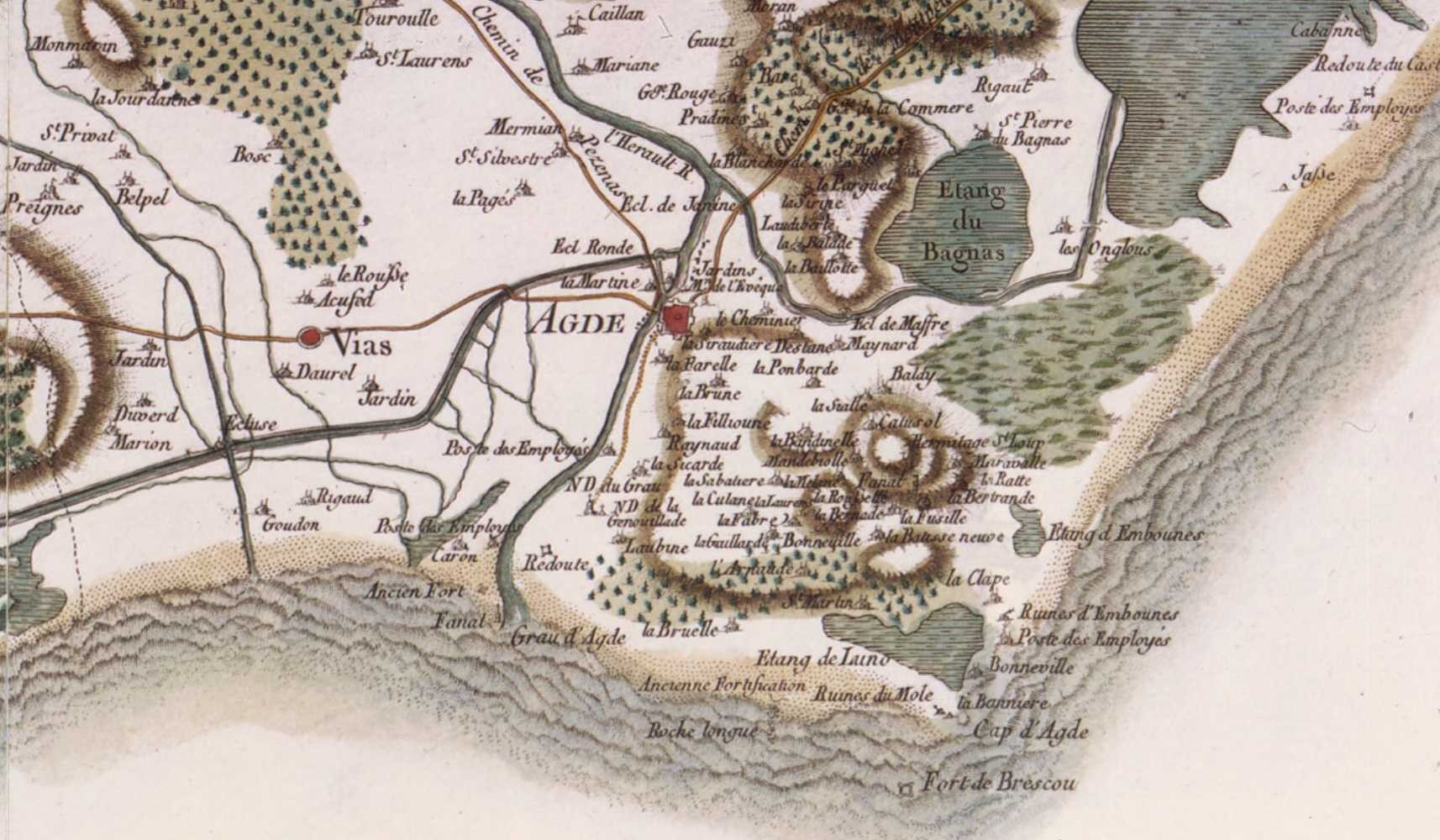 Extrait de la carte de Cassini (Agde) carte ancienne XVIIIe siècle